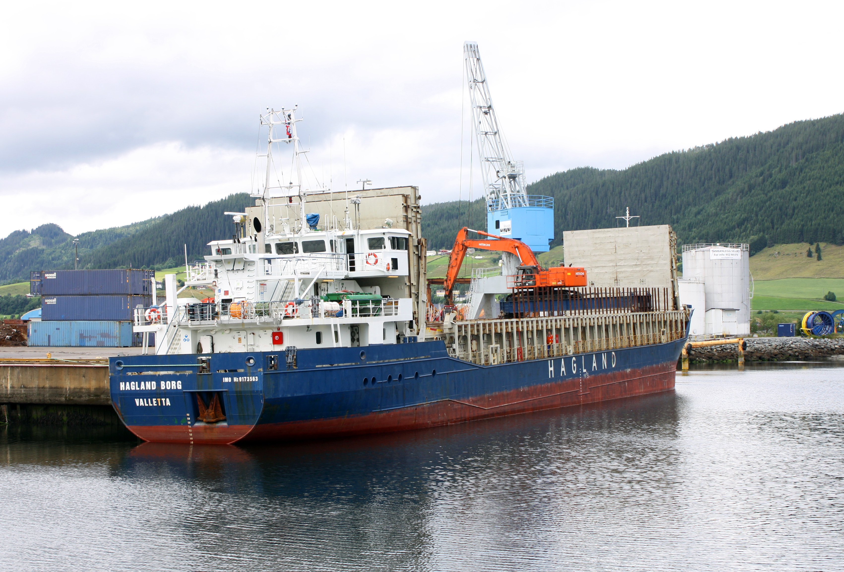 Hagland Borg i Orkanger havn for å laste tømmer til Norske Skog.